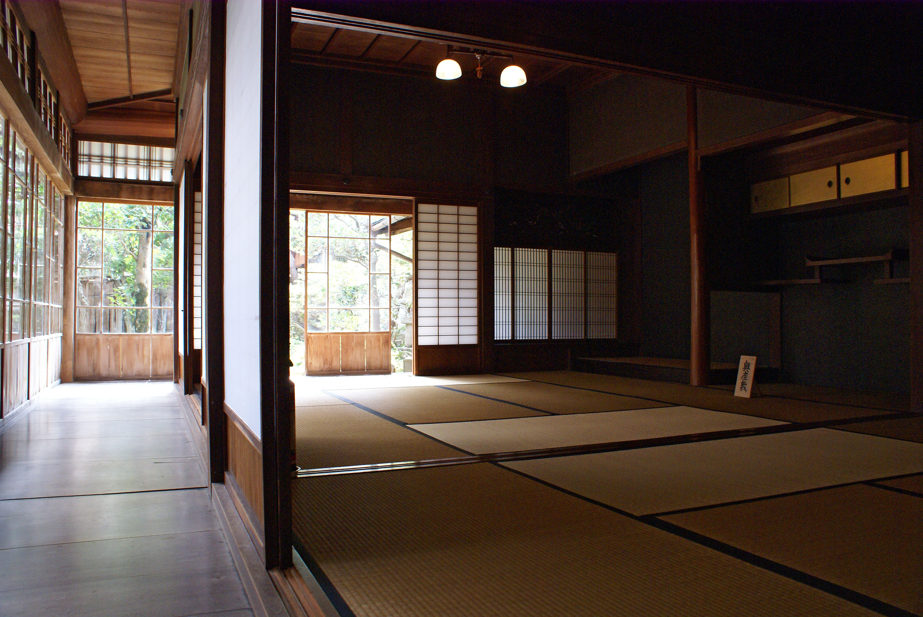 Old Katayama house in Takahashi, Okayama, Japan